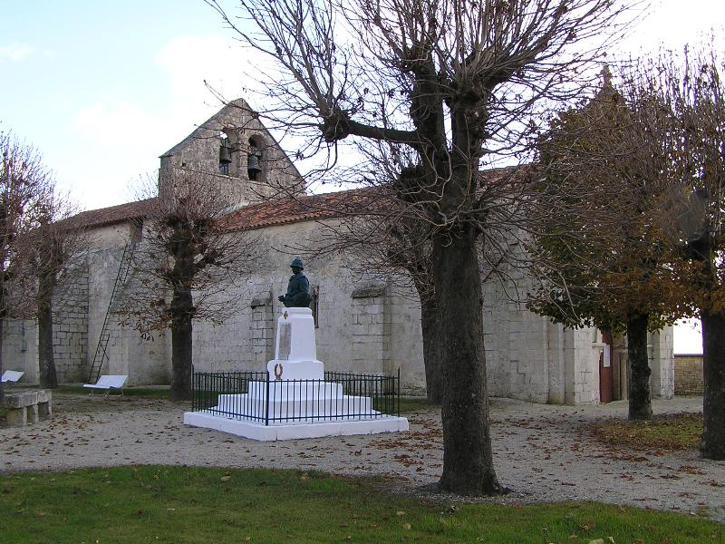 église de Ballans en Charente-Maritime et monument aux morts